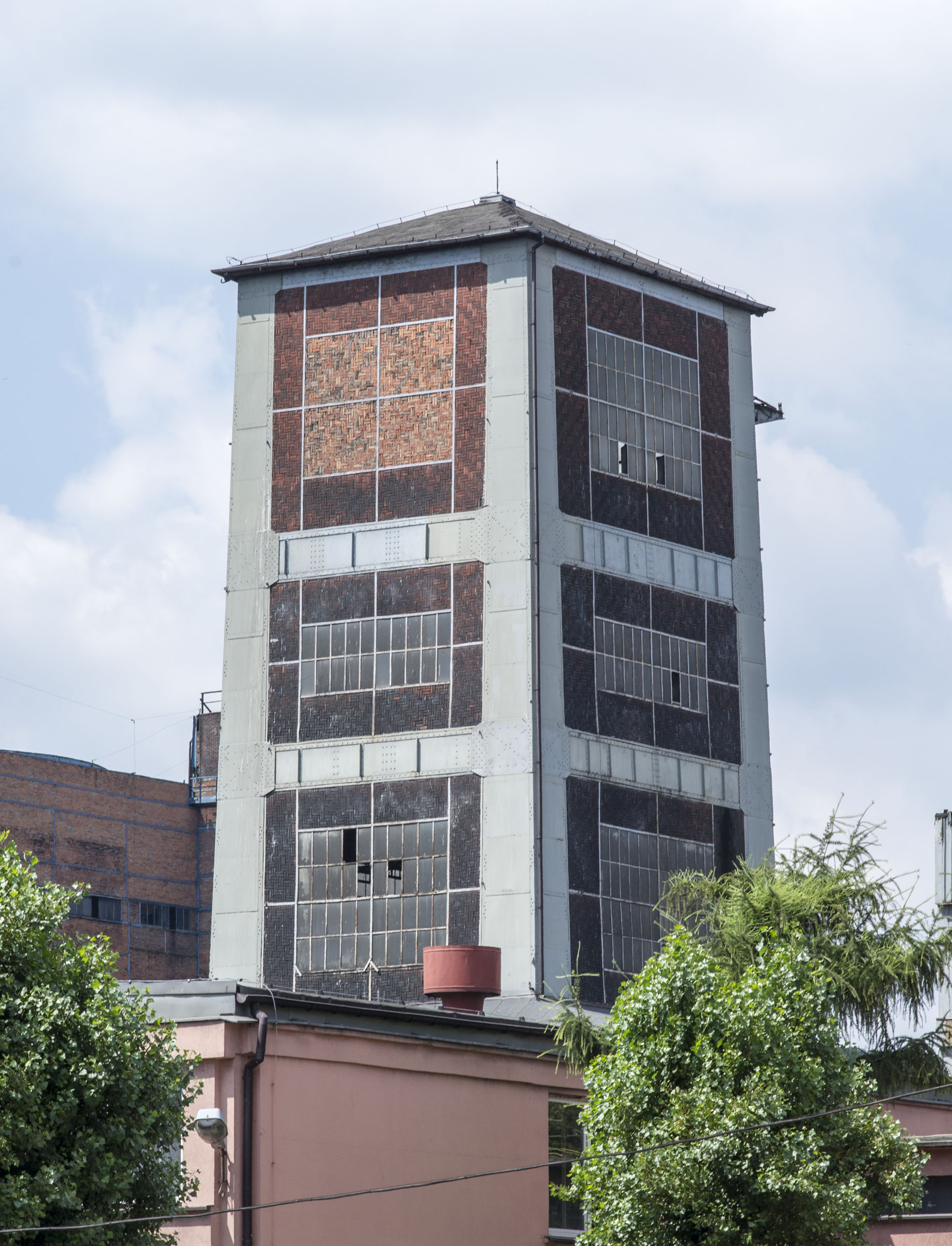 Radlin, Schacht Marcel, von Hans Poelzig entworfener Schachtturm